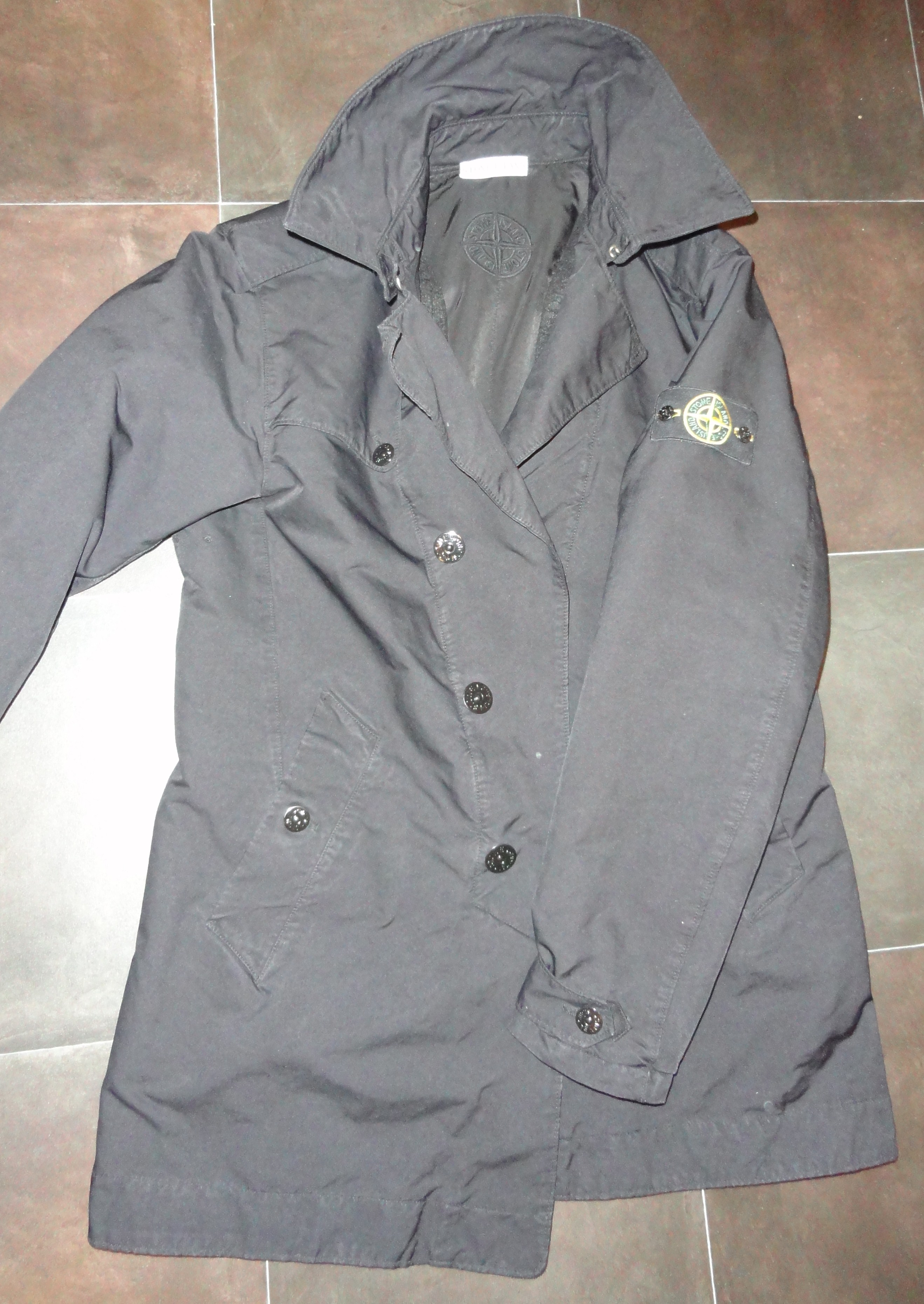 Bilde av en Stone Island-frakk